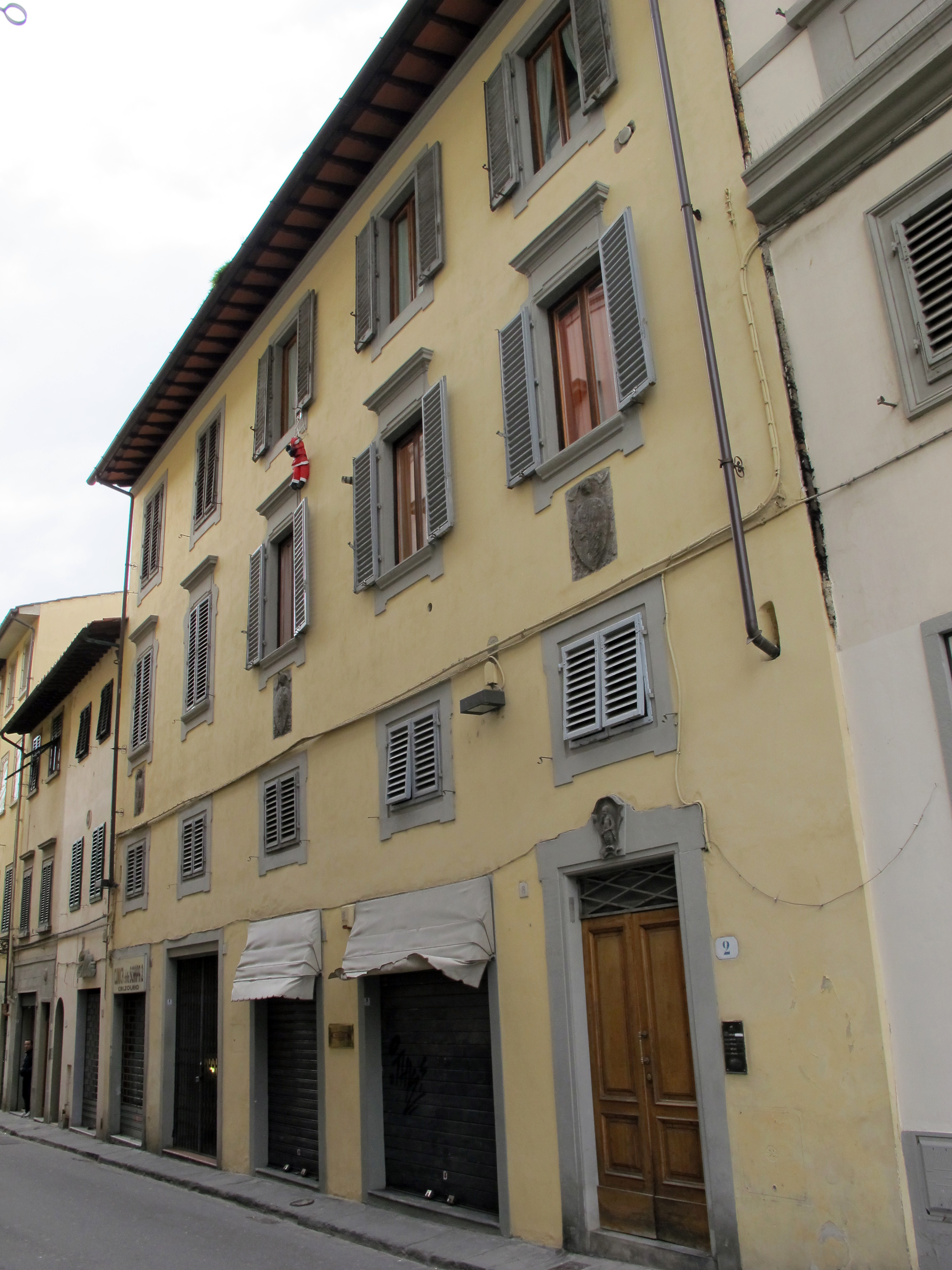 Spedale di San Niccolò degli Aliotti